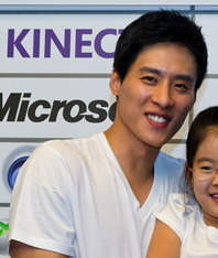 Xbox360 키넥트 한글판 타이틀 2종 발표회